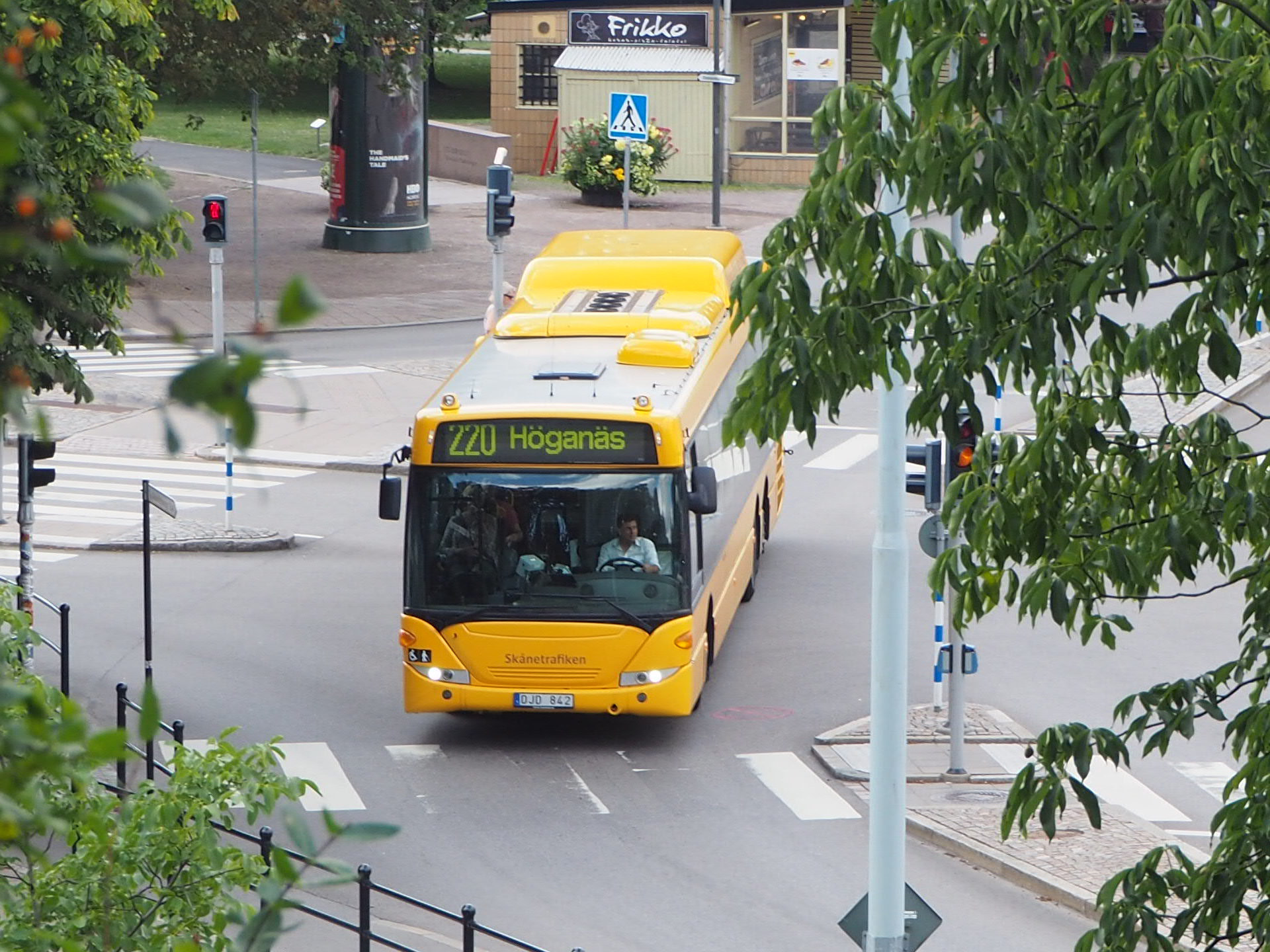 En Scania Omnilink på linje 220 mot Höganäs.